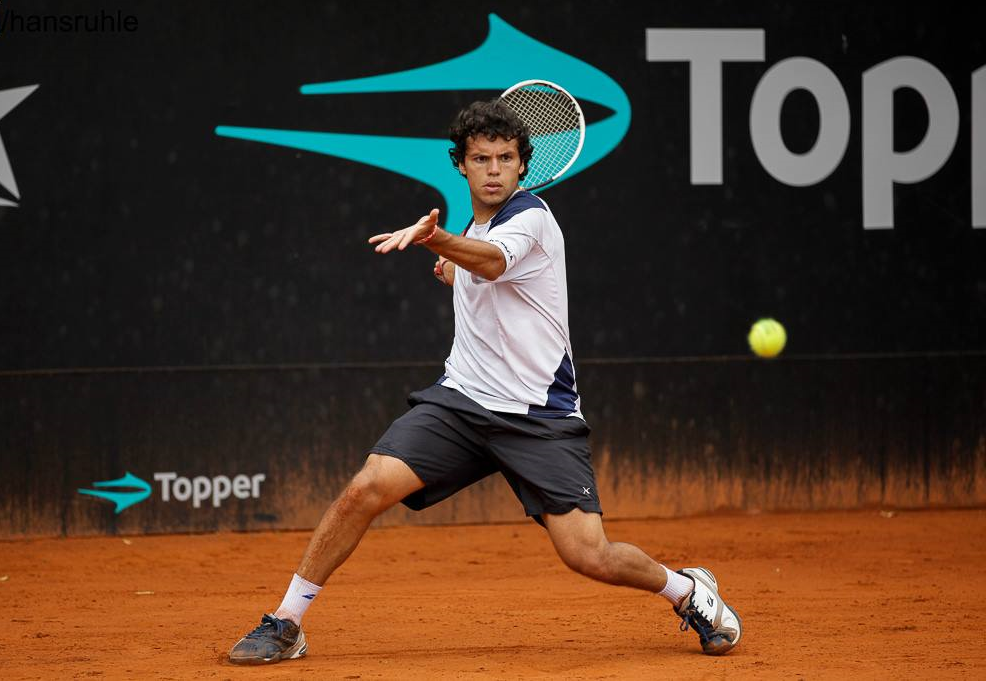 sdgss